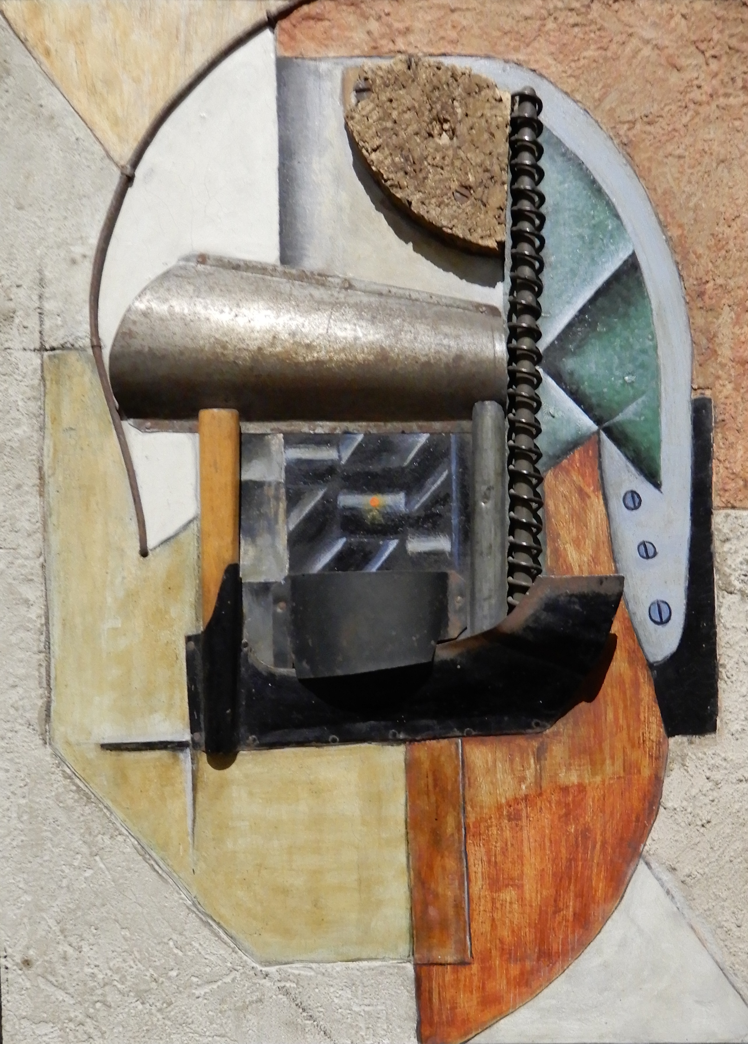 Composition abstraite dédiée à la production industrielle. Peinture à huile, granules de gypse, bois, liège, métal et vernis sur panneau. Musée russe, Saint-Petersbourg